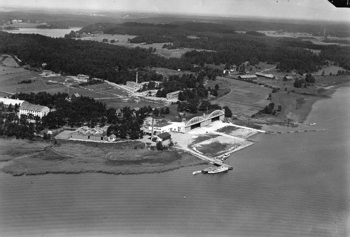 Vy över f.d flygflottiljen F 2 Hägernäs i Hägernäs, Uppland.